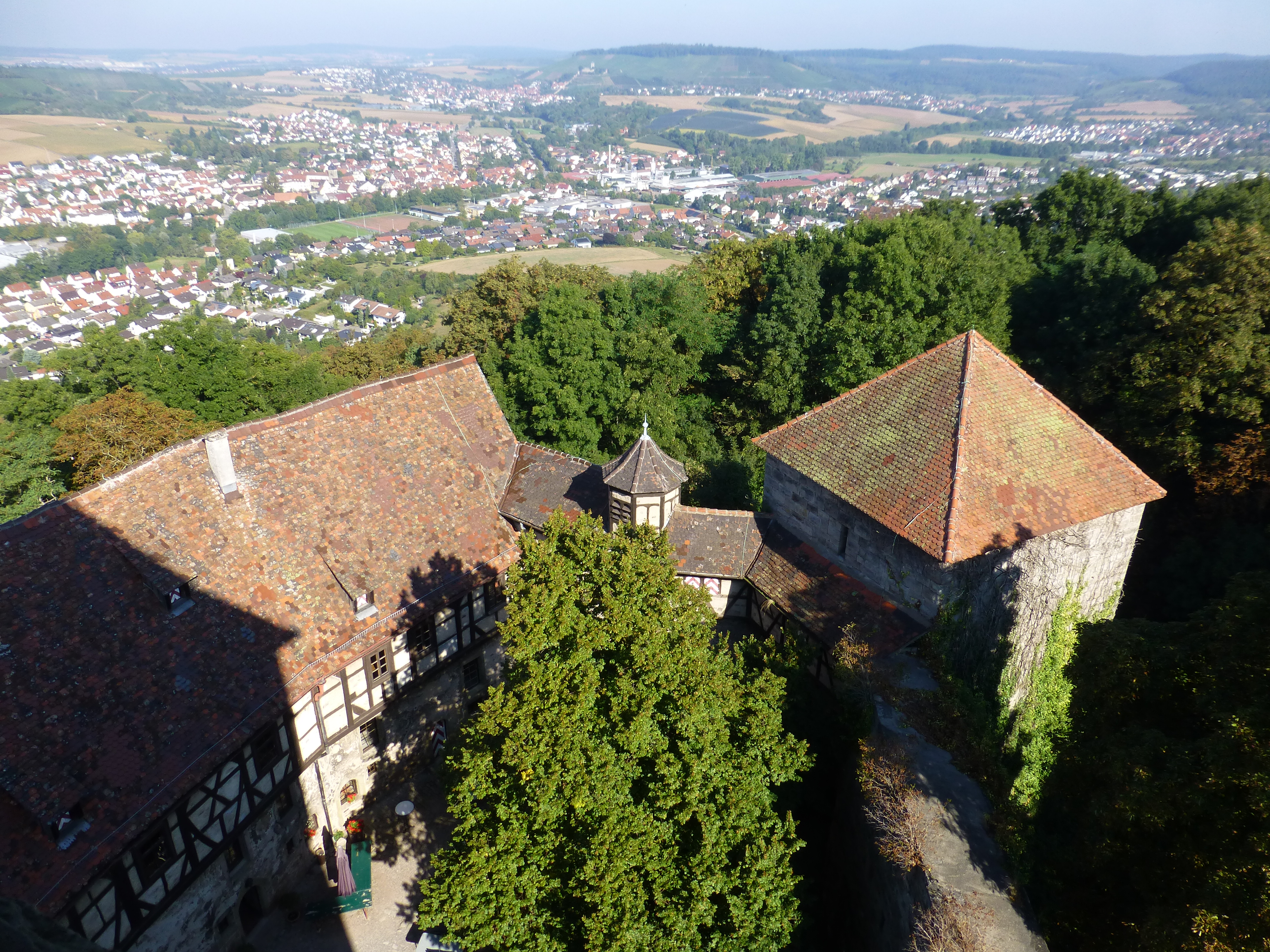 Bergfried Burg Lichtenberg; Blick von der Plattform nach Norden auf Oberstenfeld; dahinter etwas links der Mitte Beilstein und die Burg Hohenbeilstein